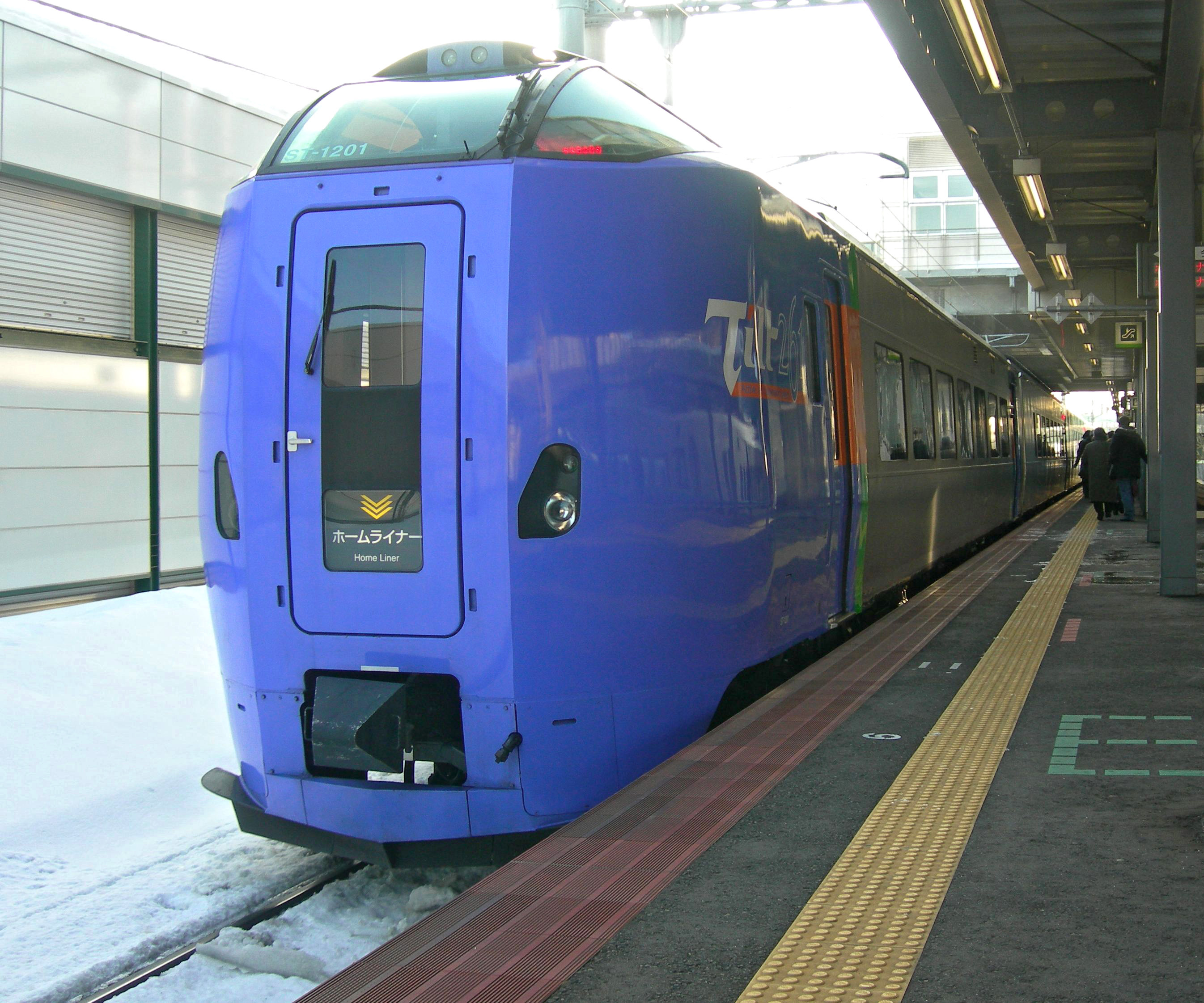 JR北海道キハ261系気動車